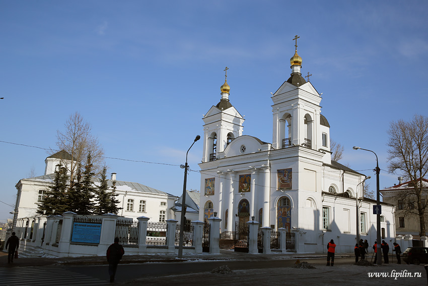 Віцебск.